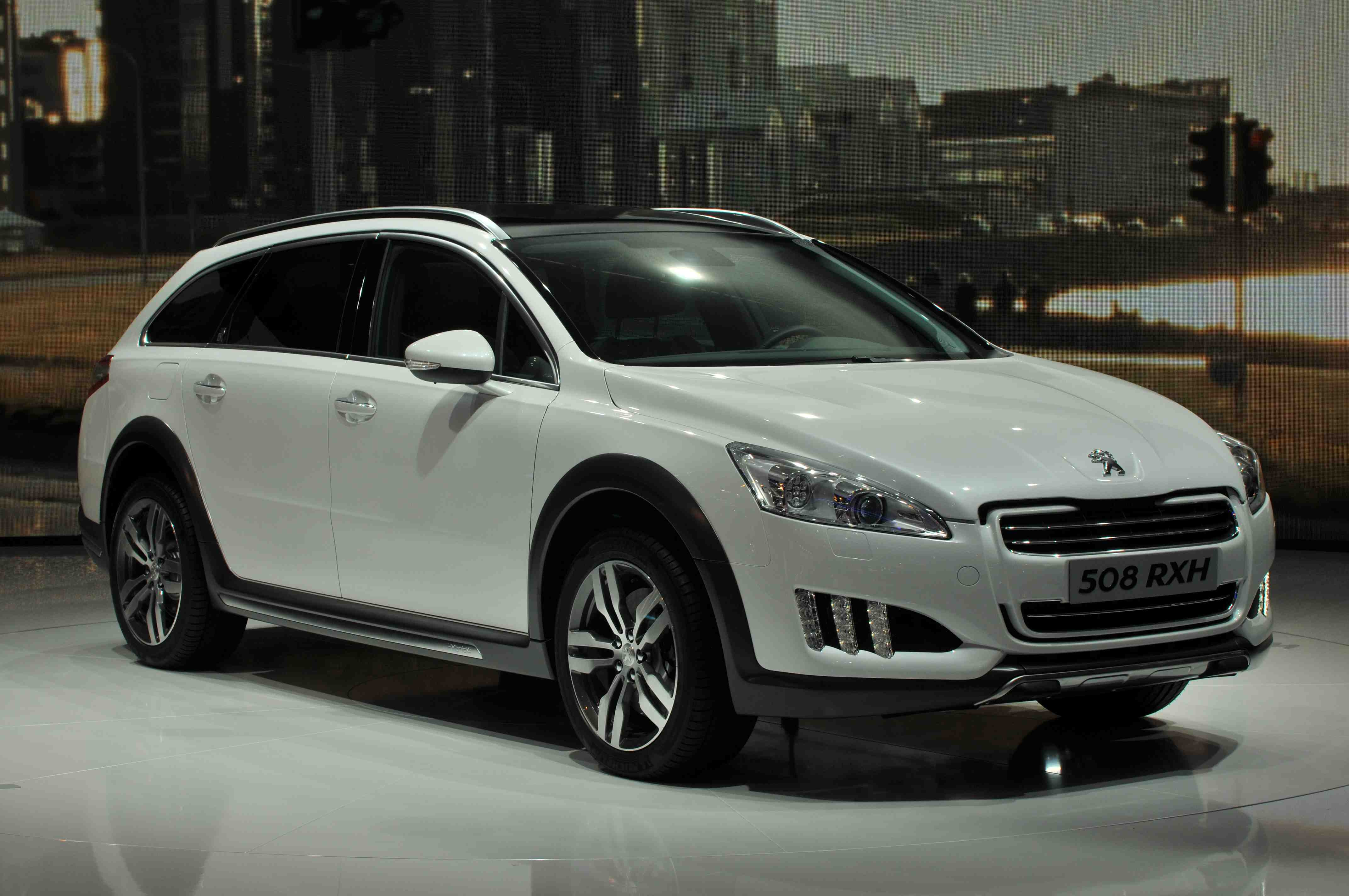 IAA 2011 - Internationale Automobilausstellung in Frankfurt/Main